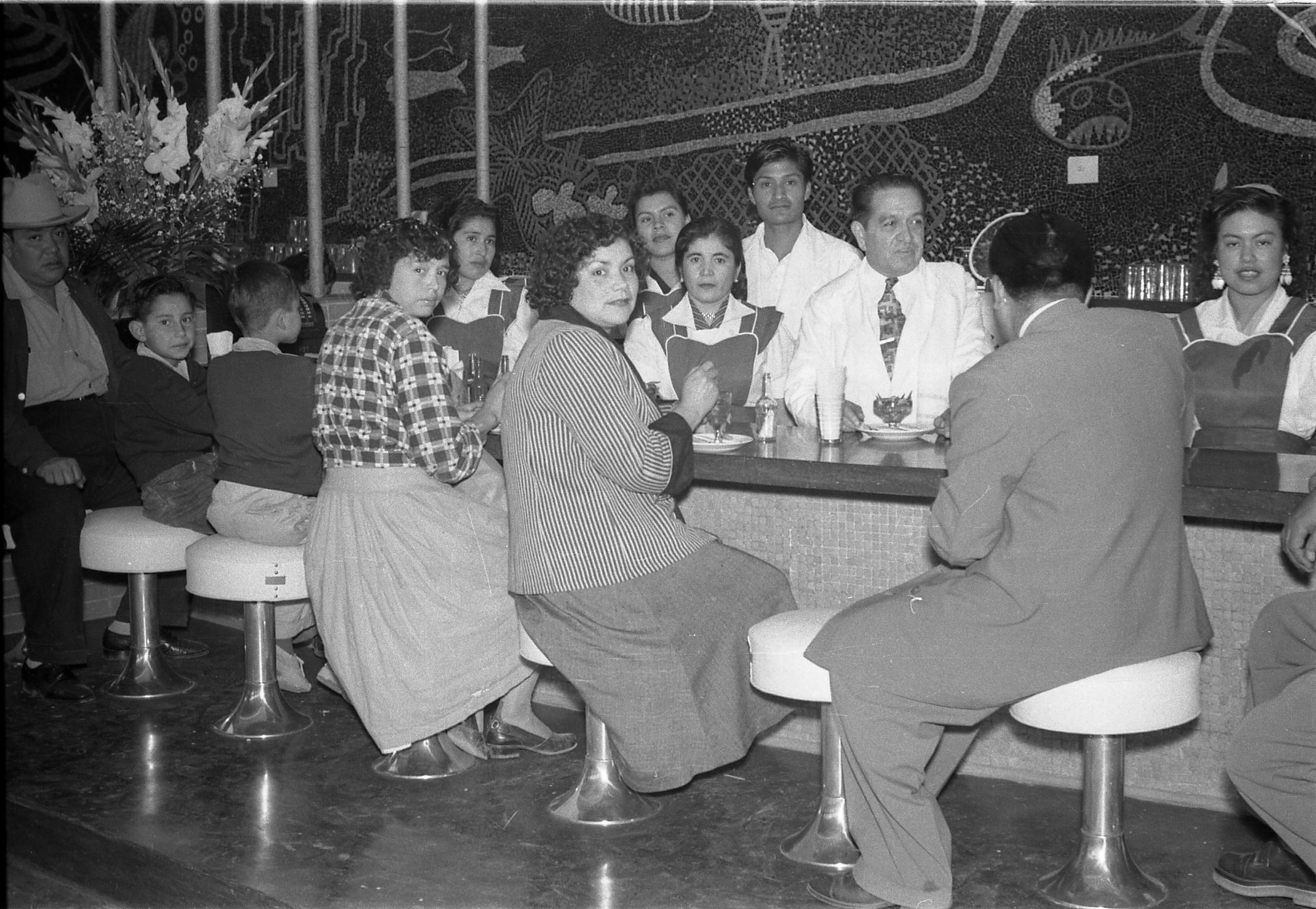 Fotografía antigua de la Ciudad de México resguardadas por el Museo Archivo de la Fotografía (MAF) de la Ciudad de México.